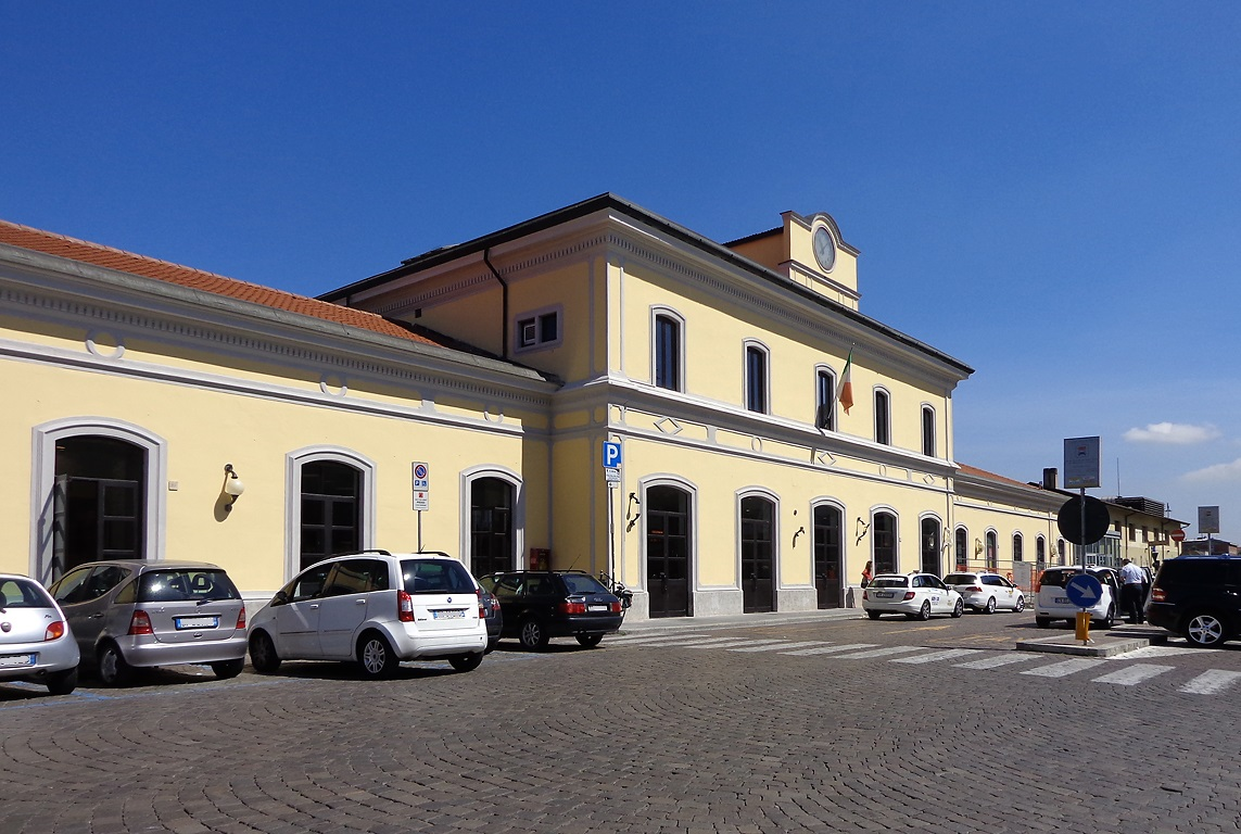 Stazione ferroviaria di Pavia. Il fabbricato viaggiatori visto dal lato della città.